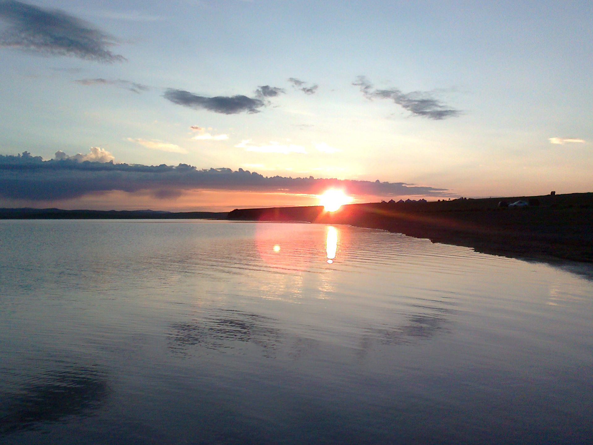 Ögii Lake side